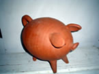 Cerdo de Greda de Pomaire